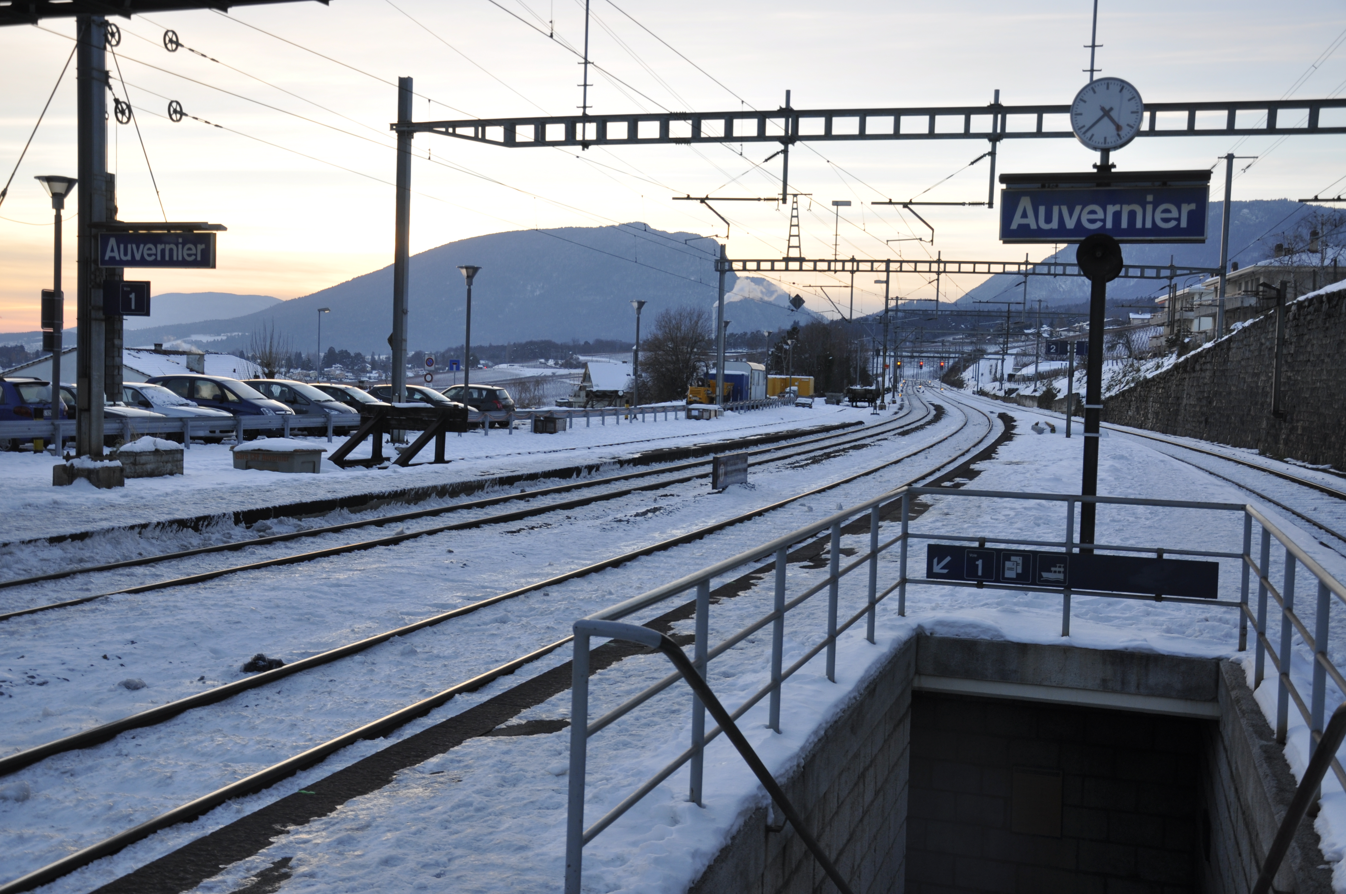 Gare d'Auvernier (Neuchâtel, Suisse)